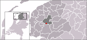 Kaart met de locatie van Terherne (Ned: Terhorne), gemaakt uit sjabloon van Wikipedia-gebruiker Mtcv